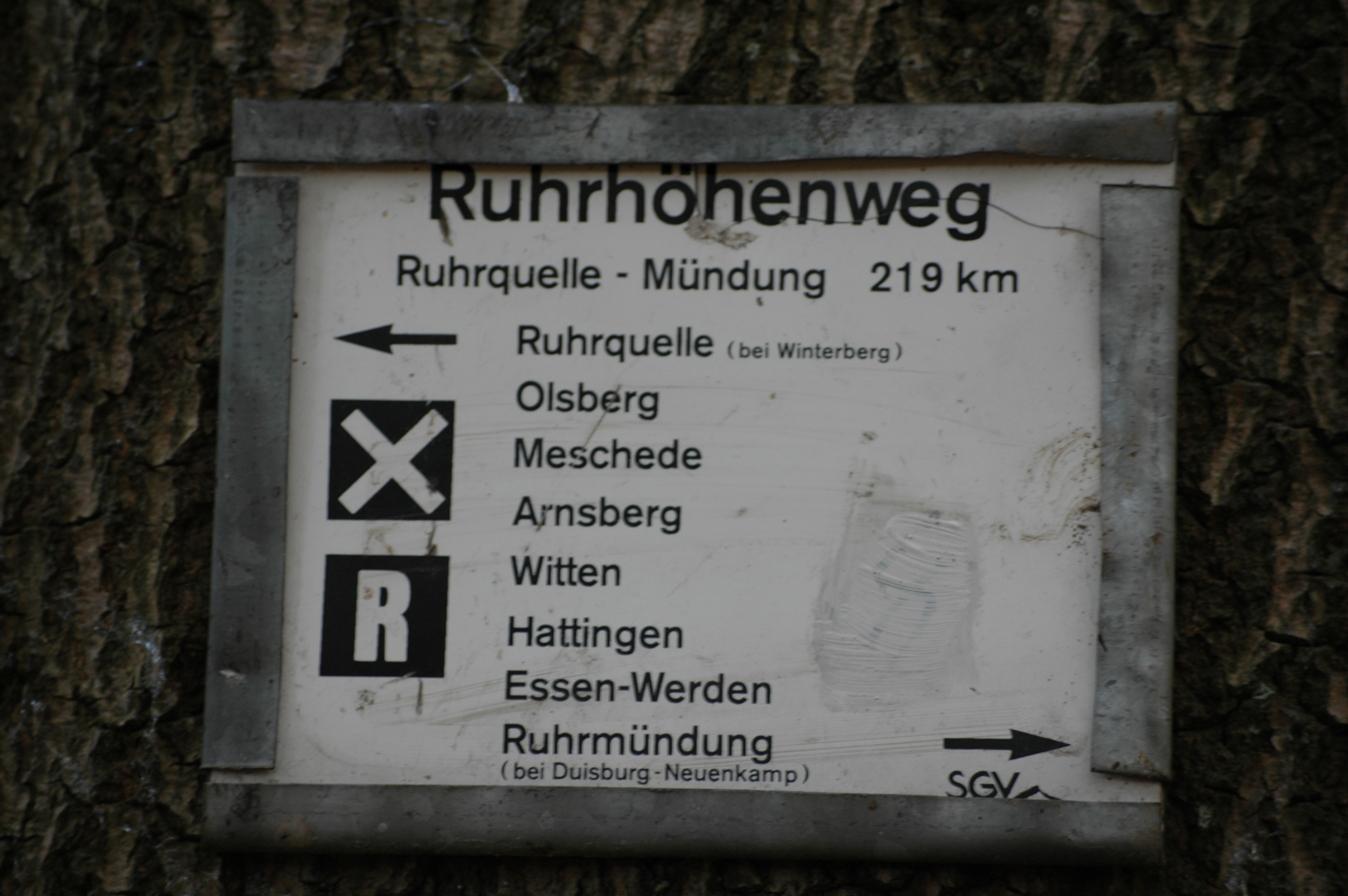 Schild des Ruhrhöhenwegs des SGV, aufgenommen in Arnsberg